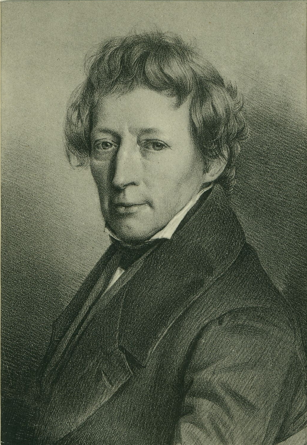 Friedrich Gottlieb Welcker (1784–1868), German classical scholar